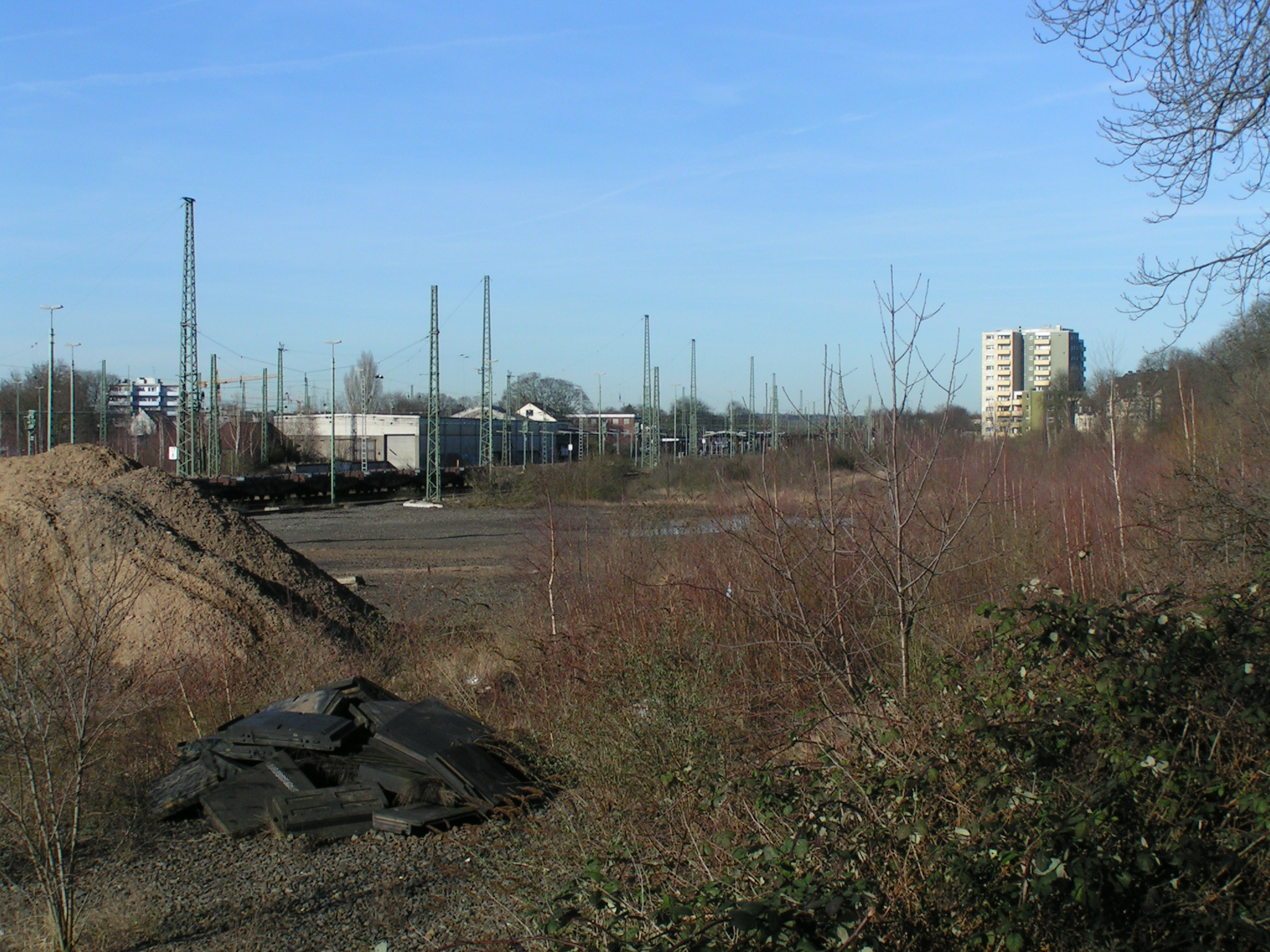 Brachliegendes Gelände der ehemaligen Gütergleise des Bahnhofs Opladen, Leverkusen, Deutschland. Dieses Gelände ist Teil der Neuen Bahnstadt Opladen. Der Bahnhof ist im Hintergrund sichtbar (rotes Klinkergebäude), rechts davon die Bahnsteige.